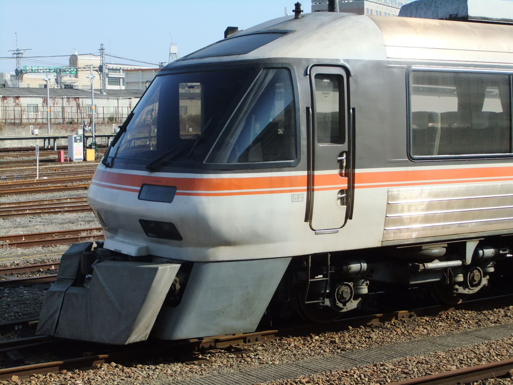 キハ85の衝撃緩和装置